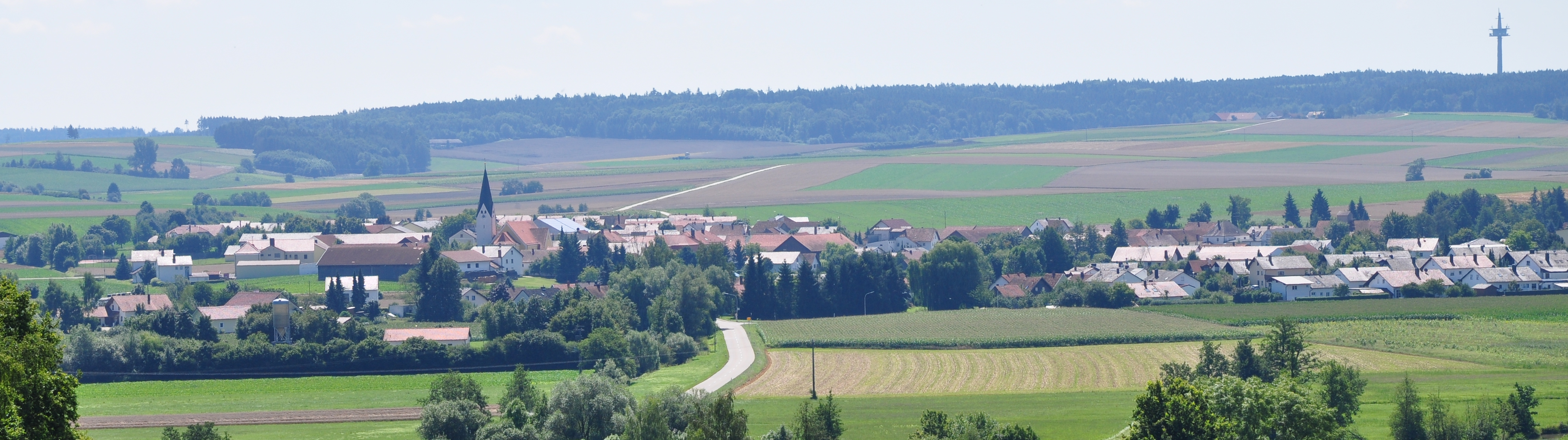 Laberweinting vom Mühlberg bei Eitting aus betrachtet